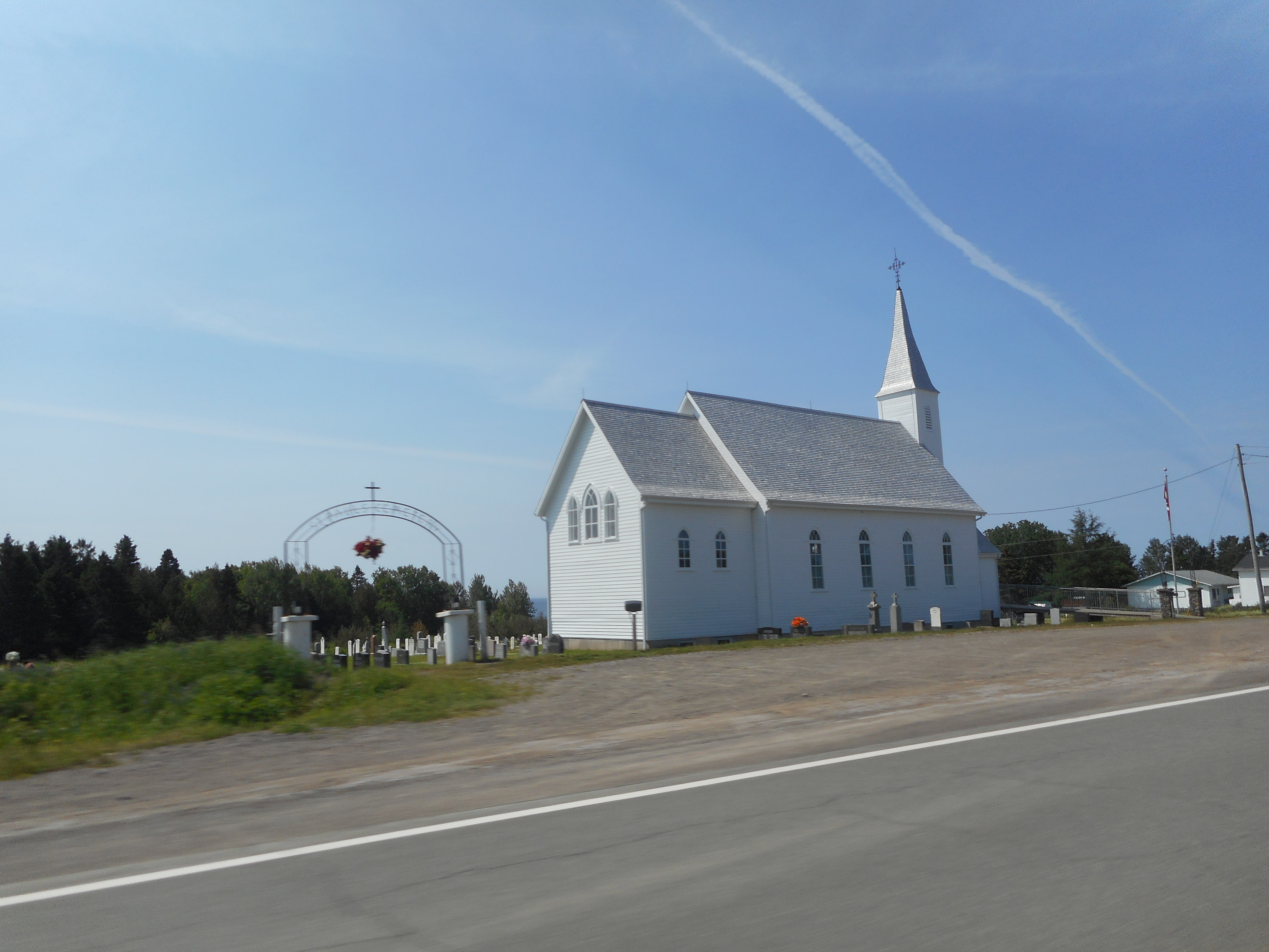 Église Saint-Paul (autre nom :Saint Paul's Anglican), Shigawake, Québec